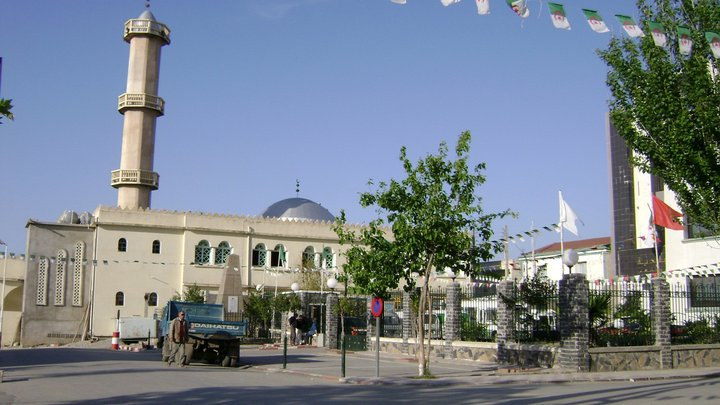 Commune Emir Abdelkader en 2011, Wilaya de Jijel (Algérie)